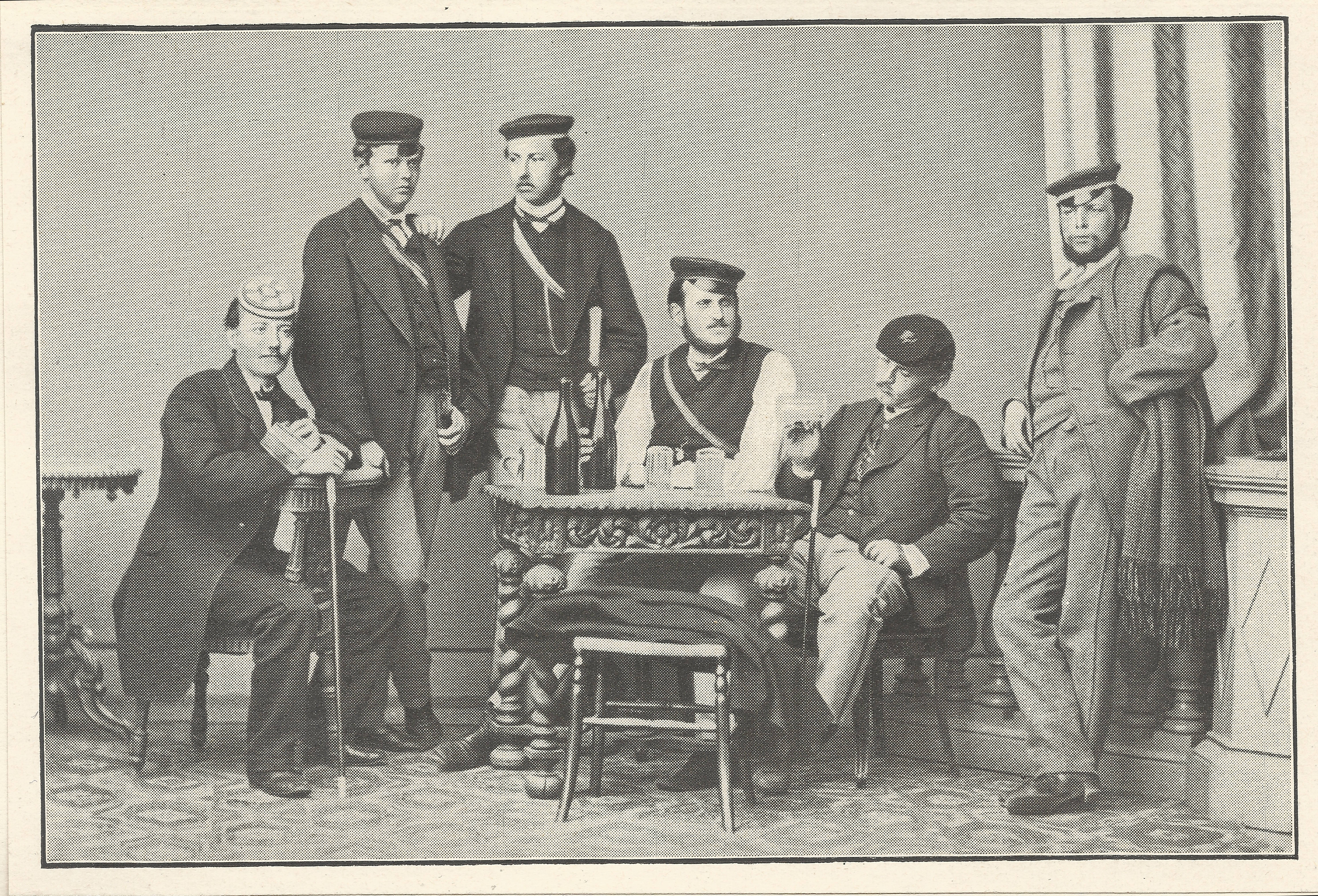 Die zur Gründungsveranstaltung erschienenen Landsmannschafter in Zwingenberg 1868